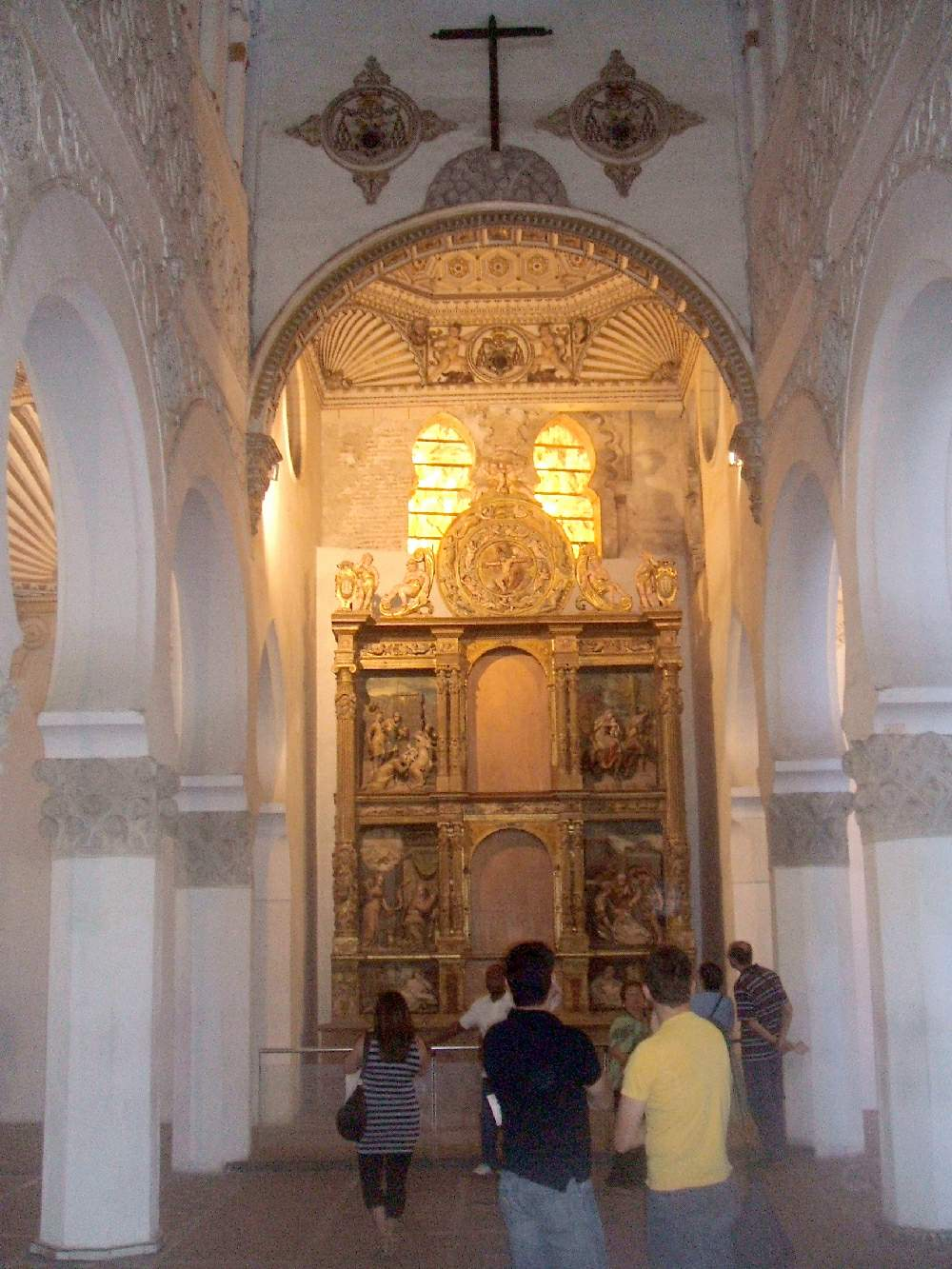 Synagogue of Santa María la Blanca, Toledo